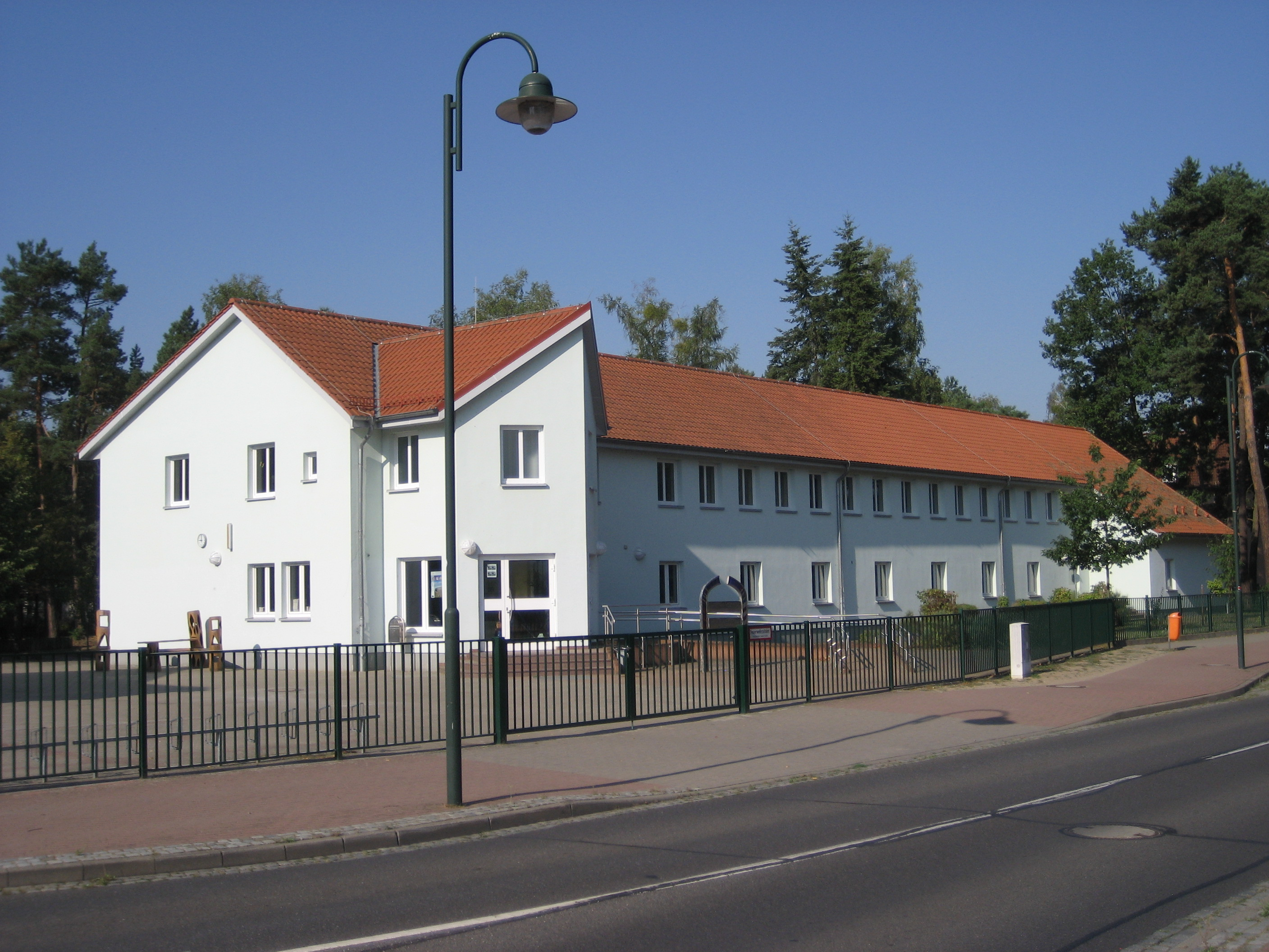 Ein Teilgebäude der Europaschule Deutsch-Polnisches Gymnasium Löcknitz (EDPG Löcknitz).